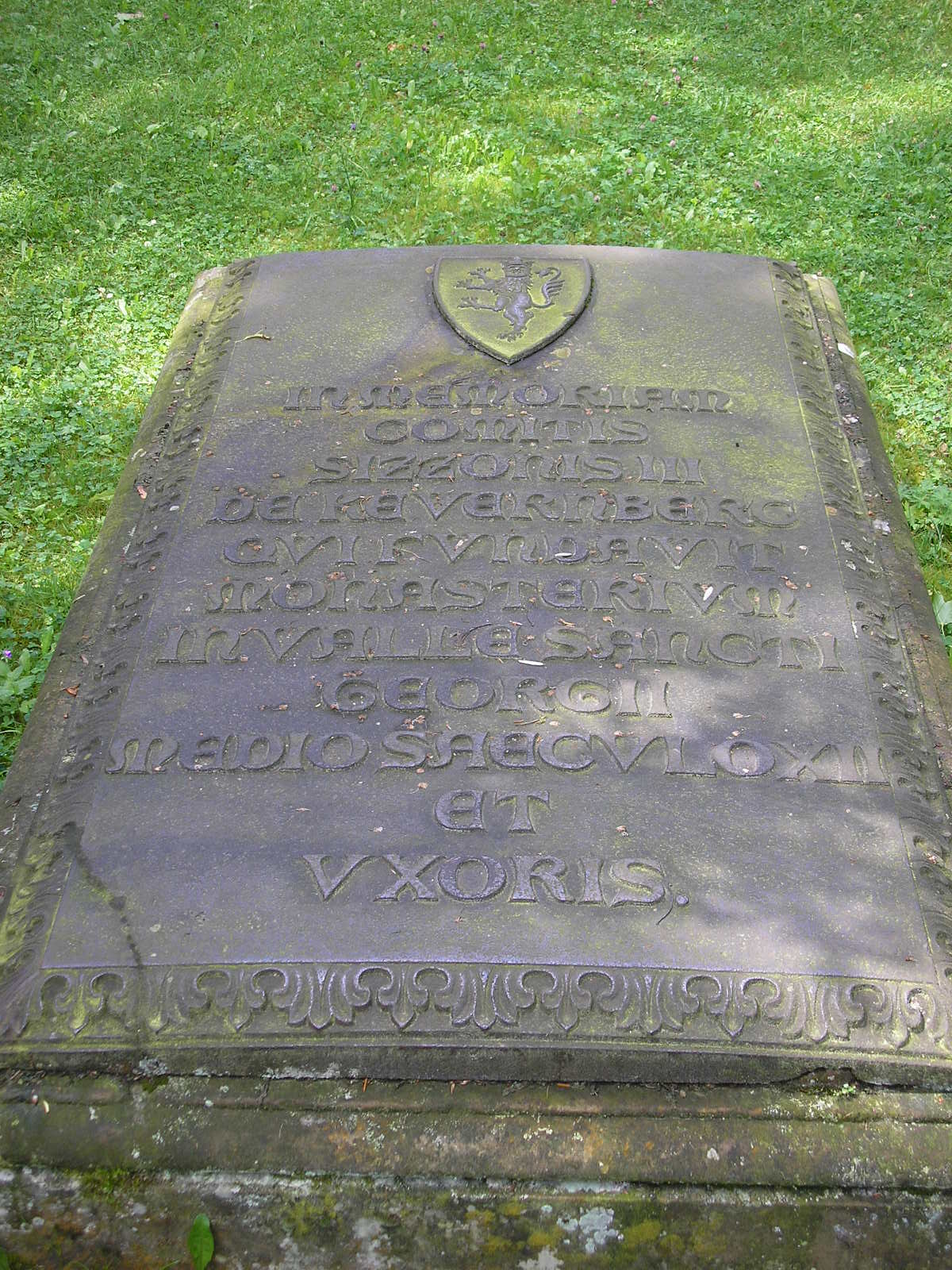 Gedenktafel für Sizzo III. von Schwarzburg-Käfernburg im Kloster Georgenthal (Thüringen).